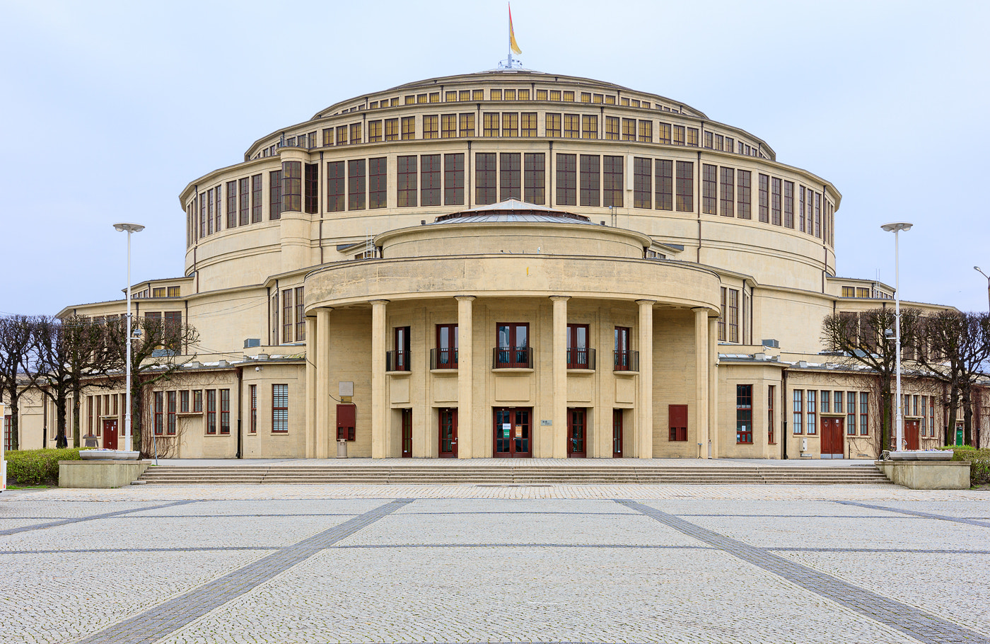 500px provided description: Hala Stulecia we Wroc?awiu Zdj?cie do wykorzystania komercyjnego i niekomercyjnego. Prosimy o oznaczenie HRS Poland jako autora zdj?cia. Na przyk?ad: ?r?d?o: ?r?d?o: HRS Poland - Wroc?aw Please tag HRS Poland as a source. For example: Source: HRS Poland - Wroclaw [#poland ,#monument ,#polska ,#wroclaw ,#hala stulecia]